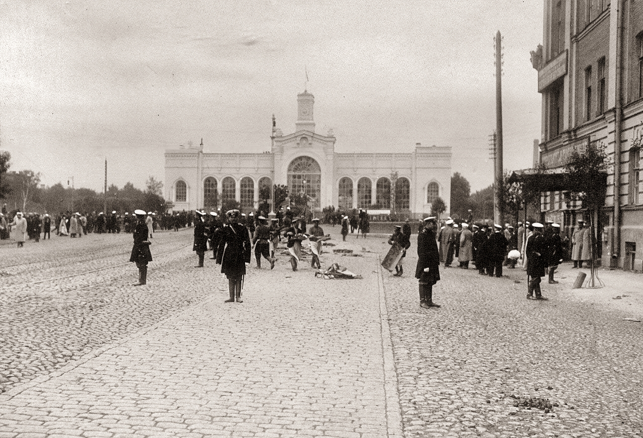 La scena dell'attentato al ministro dell'Interno russo Vjačeslav von Pleve